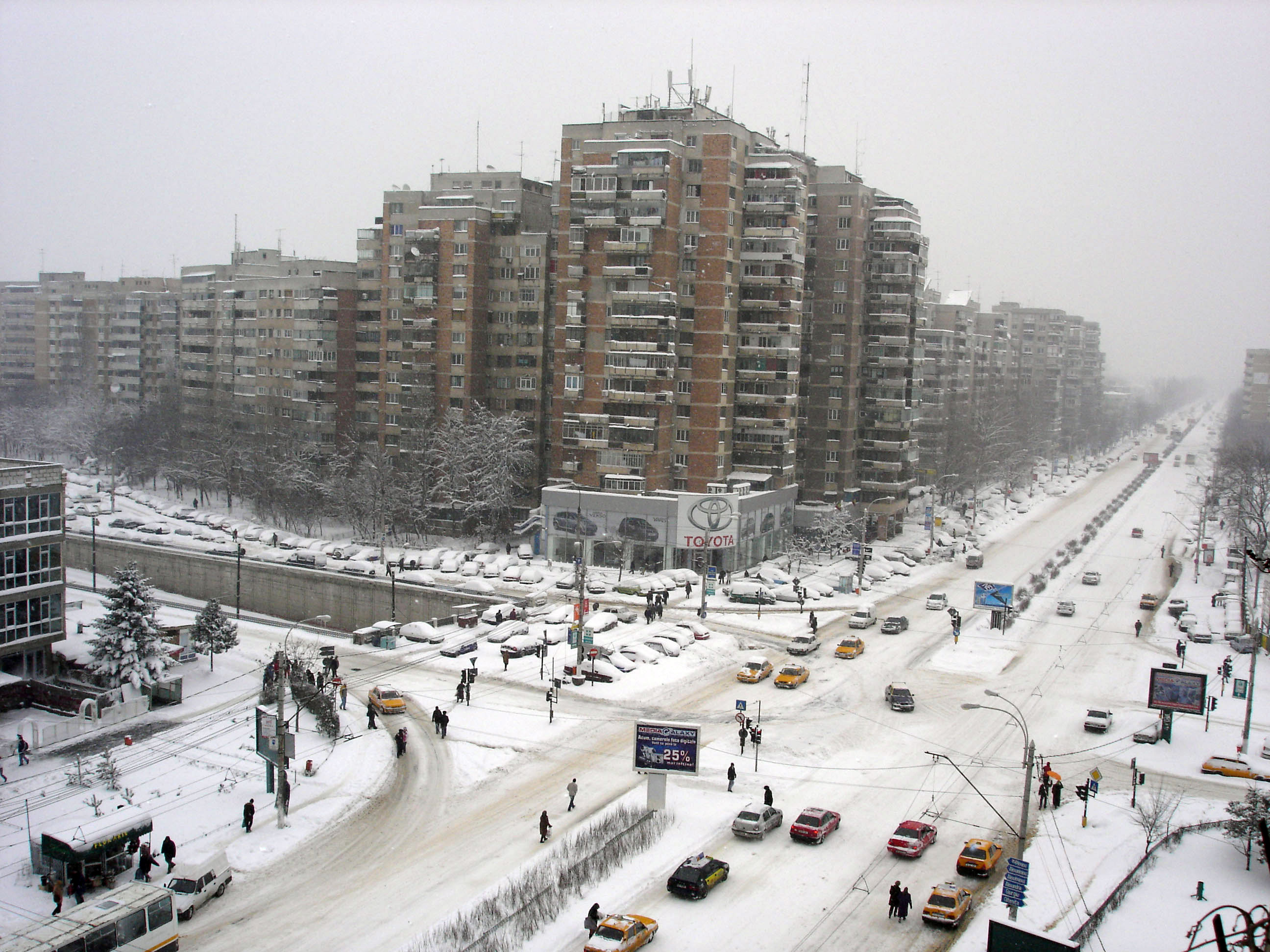 Pasajul de la Lujerului, în cartierul Militari, Bucureşti. Fotografie a lui Utilizator:Pixi, uploadată la Wikipedia în Română sub numele Imagine:Lujerului.JPG. Modificată în photoshop (auto-levels).